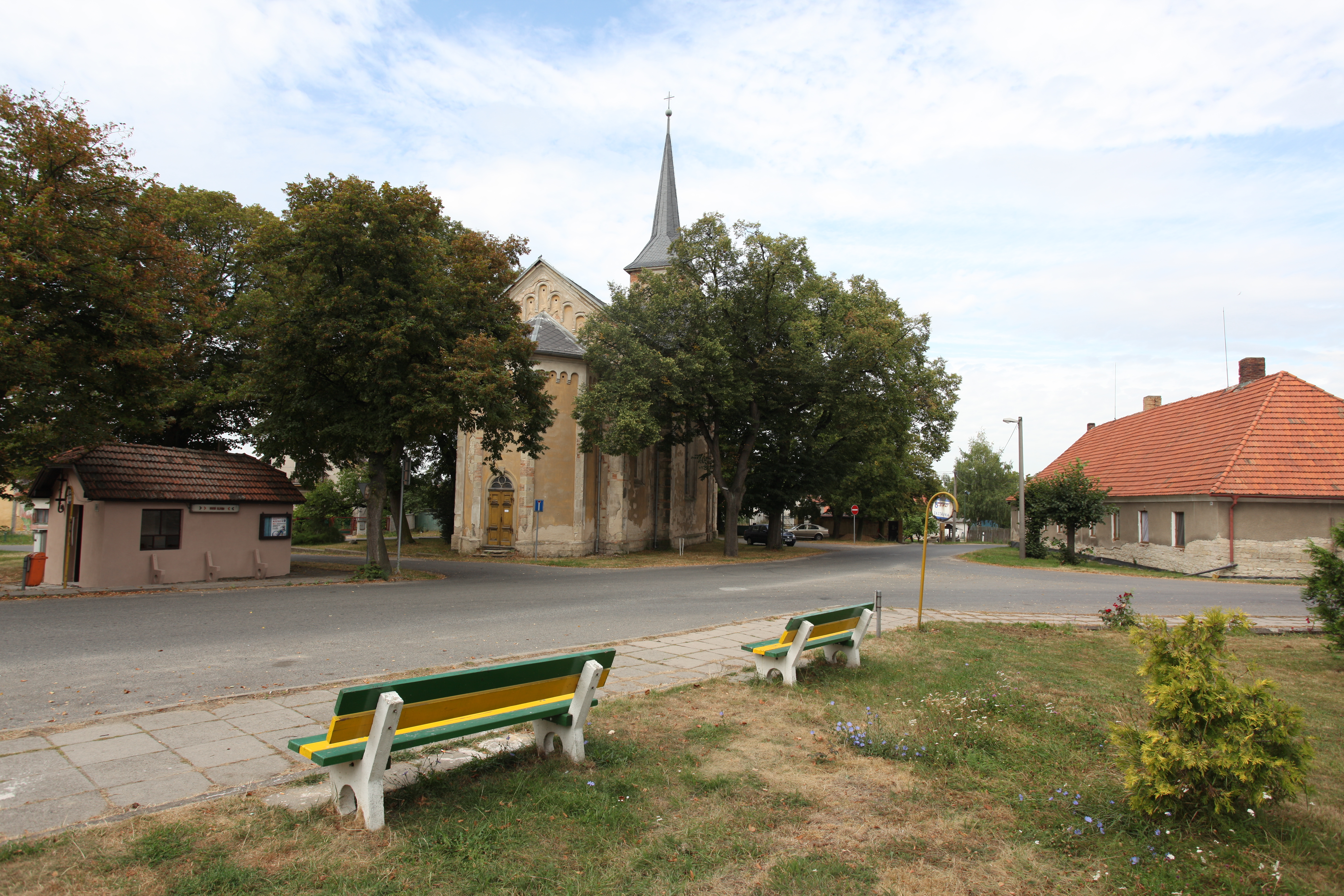 Česky: Horní Slivno, náves s kostelem sv. Martina